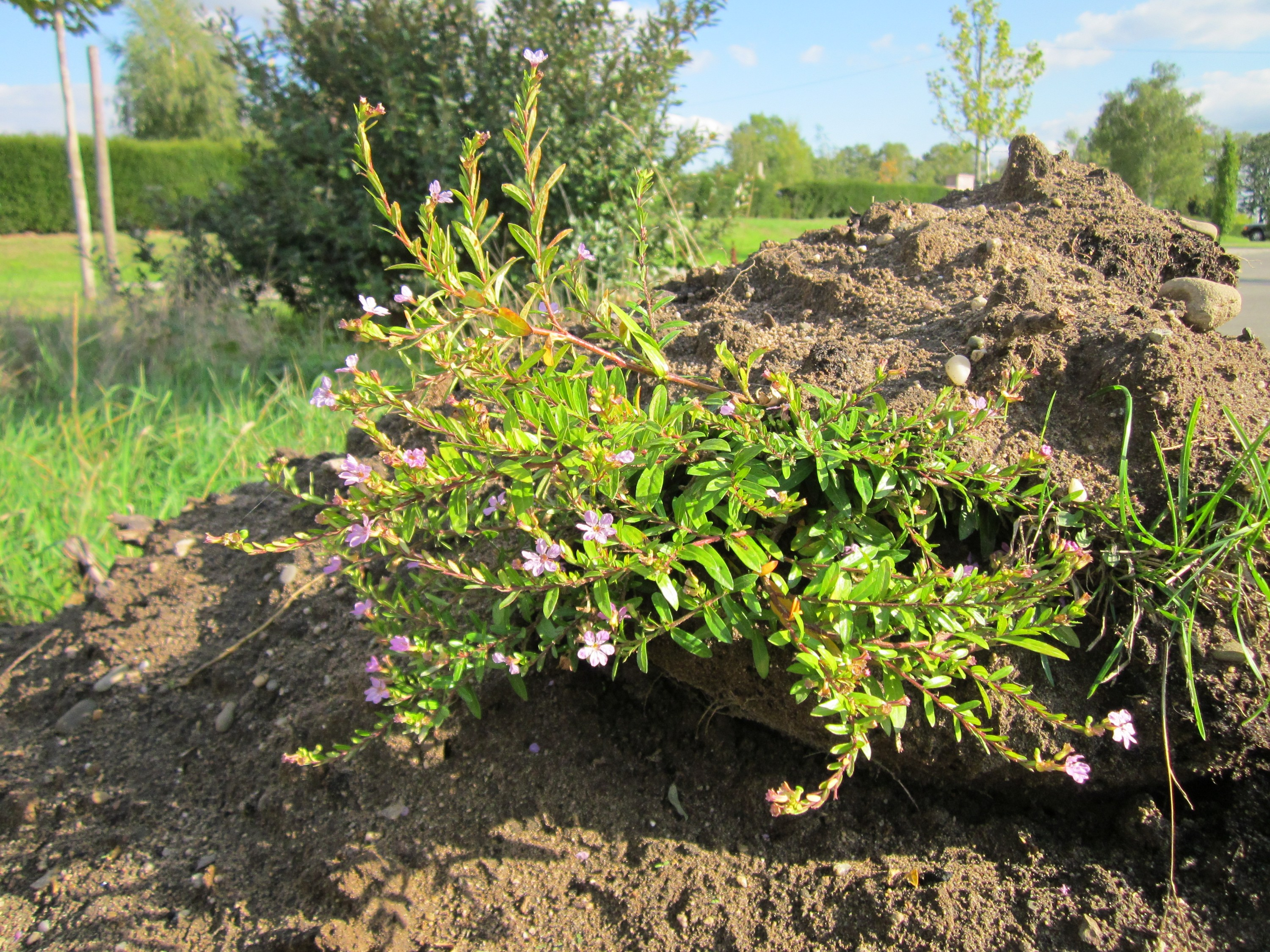 Japanische Scheinmyrthe (Cuphea hyssopifolia) auf einer Ruderalfläche beim Reilinger Friedhof